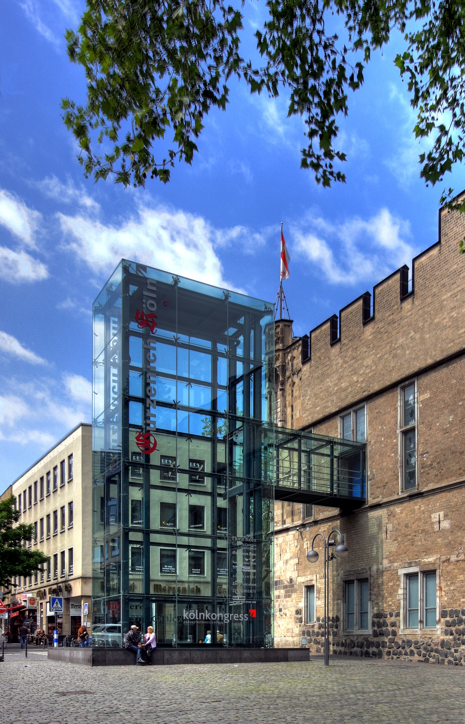 Günter-Wand-Platz in Köln, Südseite des Gürzenich, mit gläsernem Aufzug.